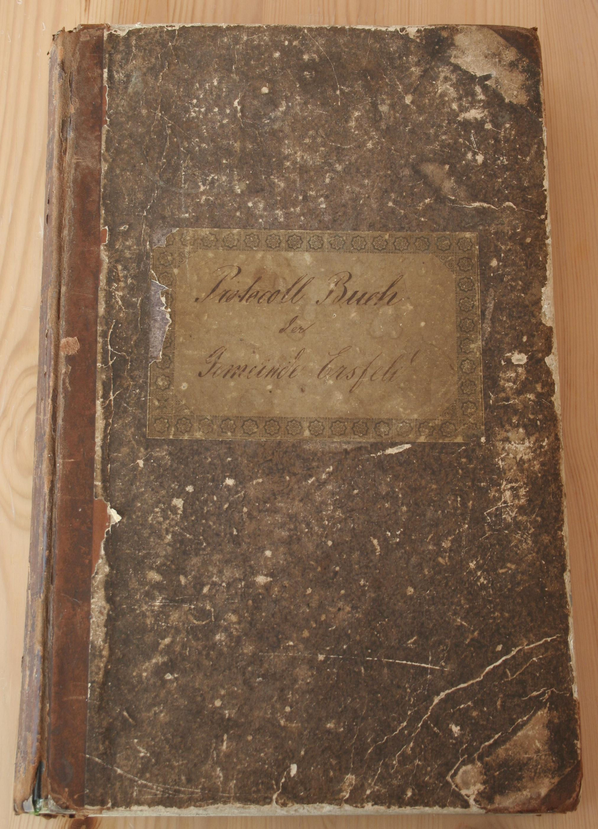 Altes Protokollbuch der Ortsgemeinde Ersfeld von 1845